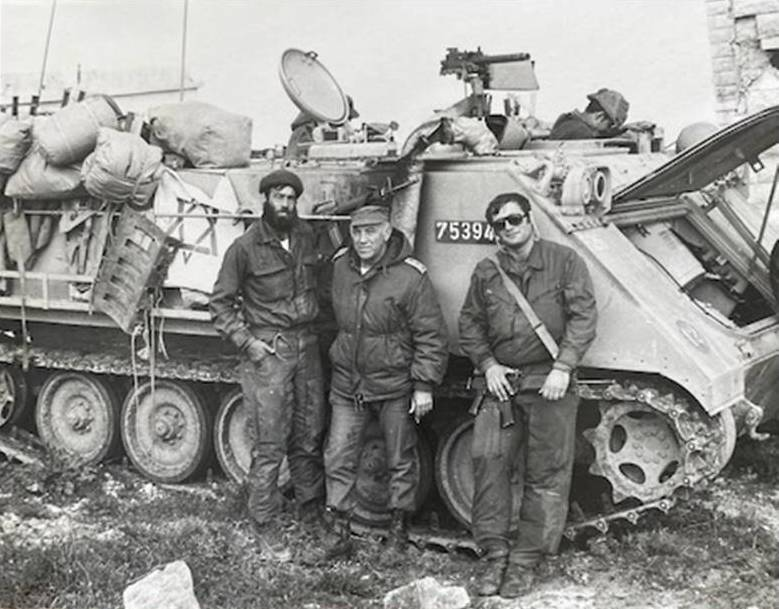 פגישה מקרית בין זאב סלעי לבנו מושיק, כרופא צבאי, במהלך מבצע ליטני ב-1978